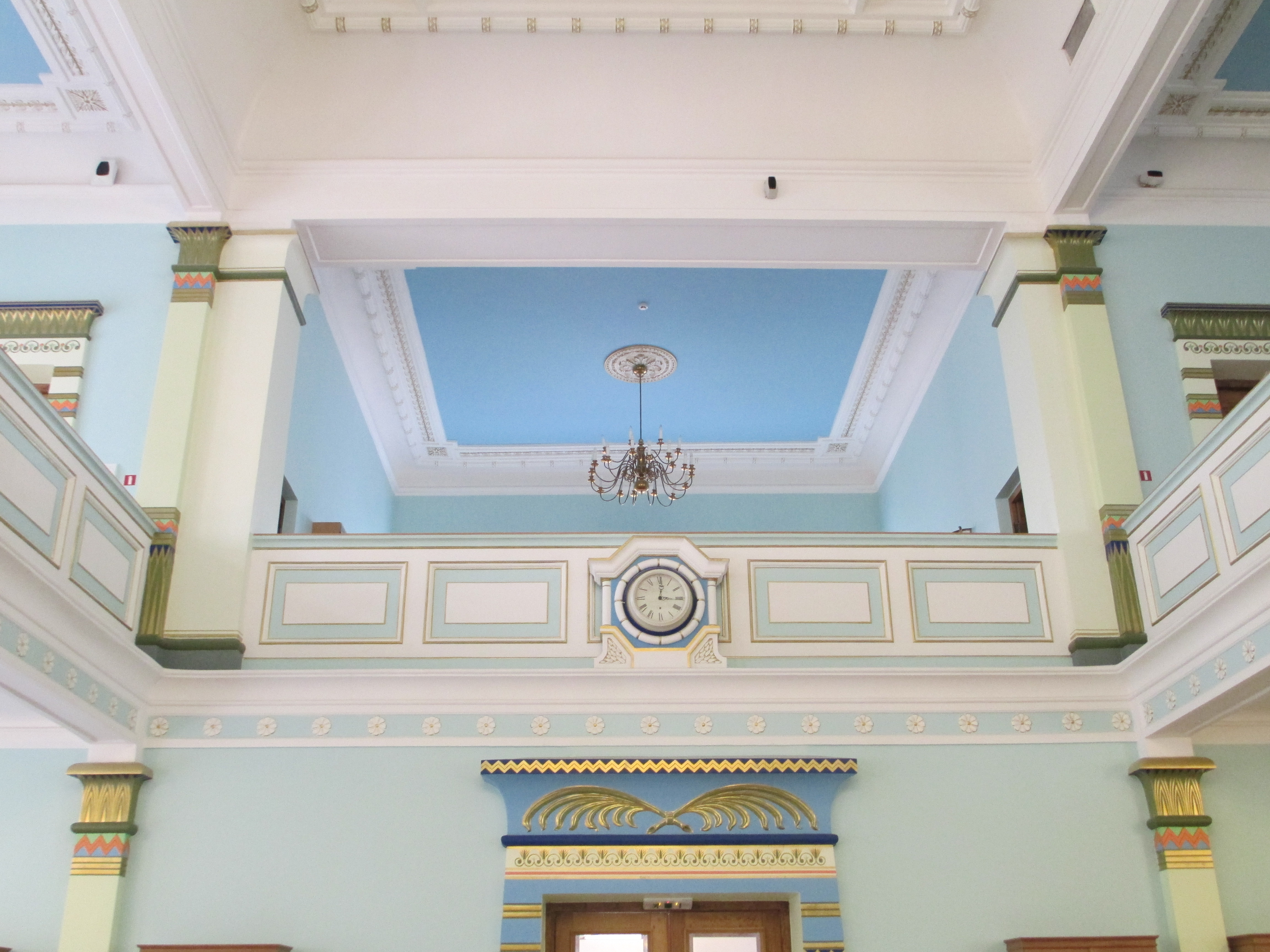 בית הכנסת פייטב בריגה